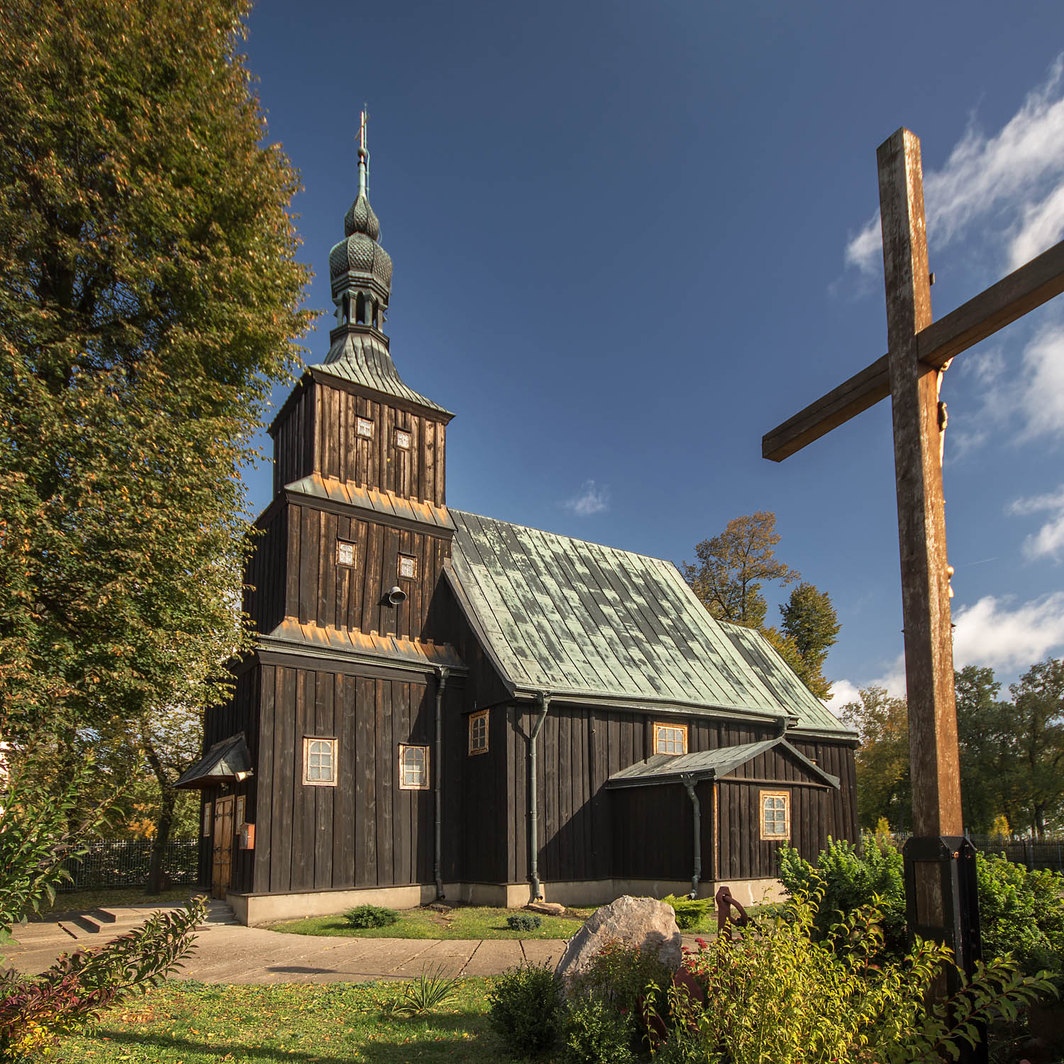 Piątek Wielki, kościół par. p.w. św. Marcina, 1740